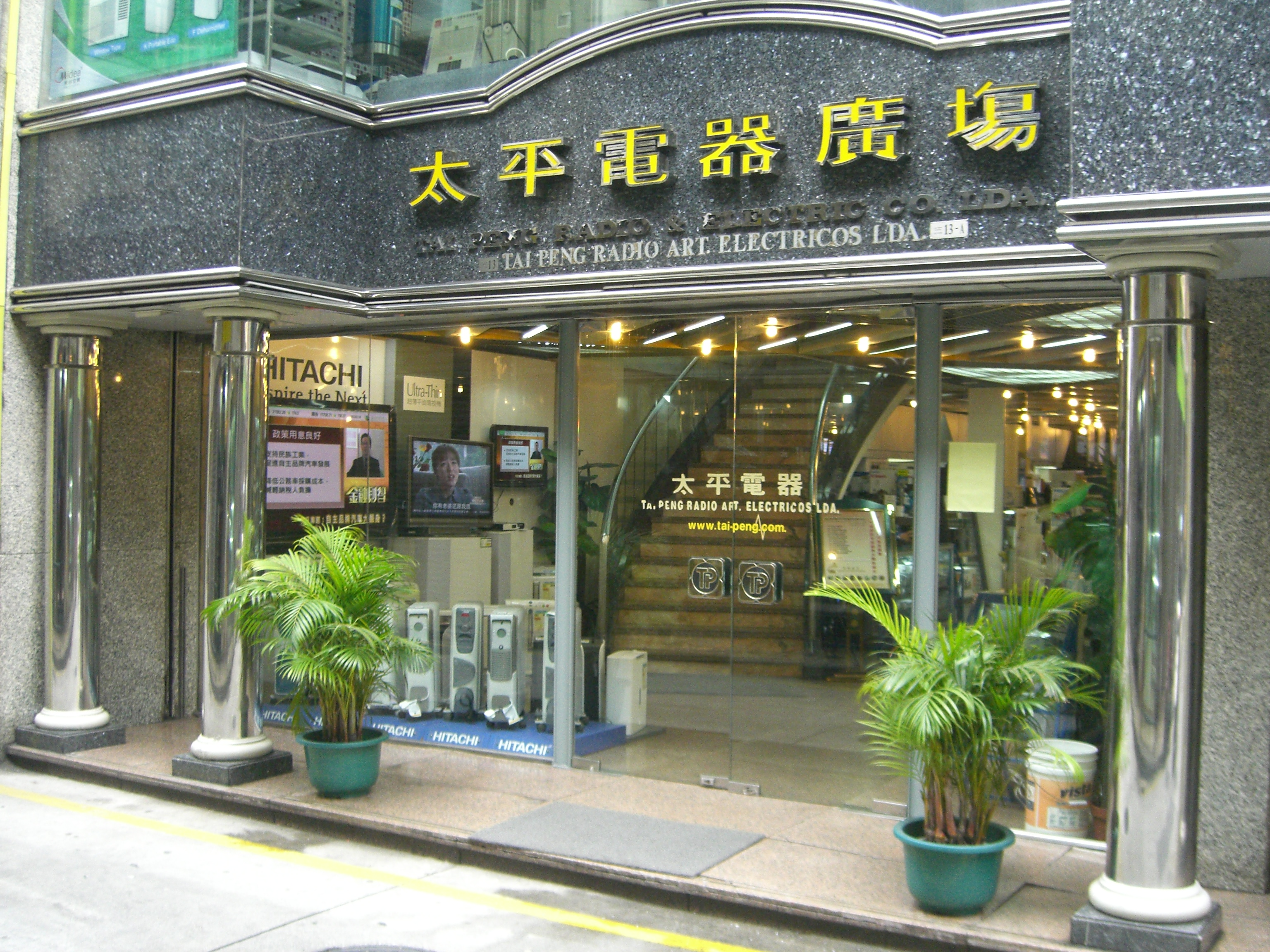 太平電器廣場